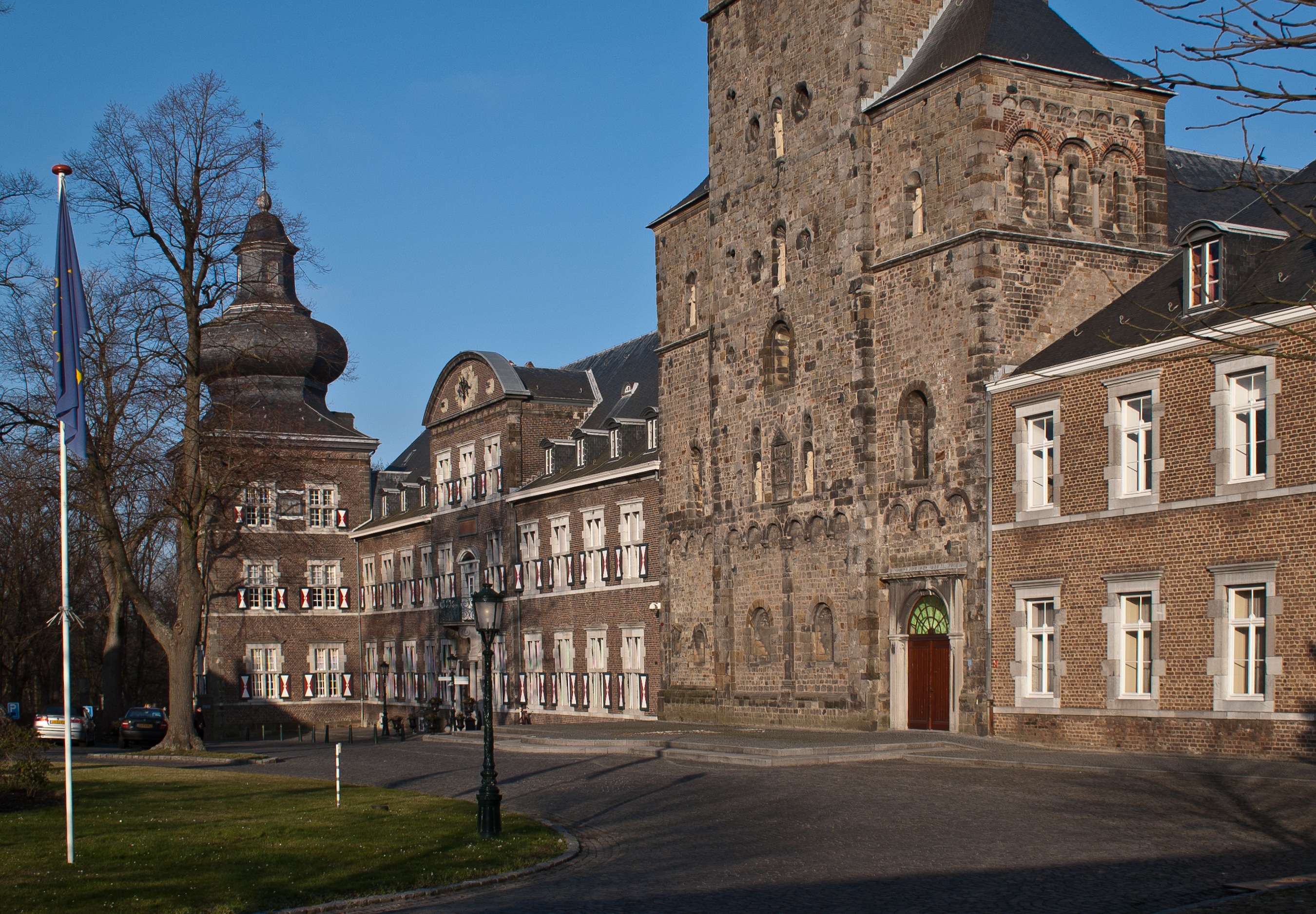 Kirchturm und angrenzende Klostergebäude des Klosters Rolduc in Kerkrade, Niederlande